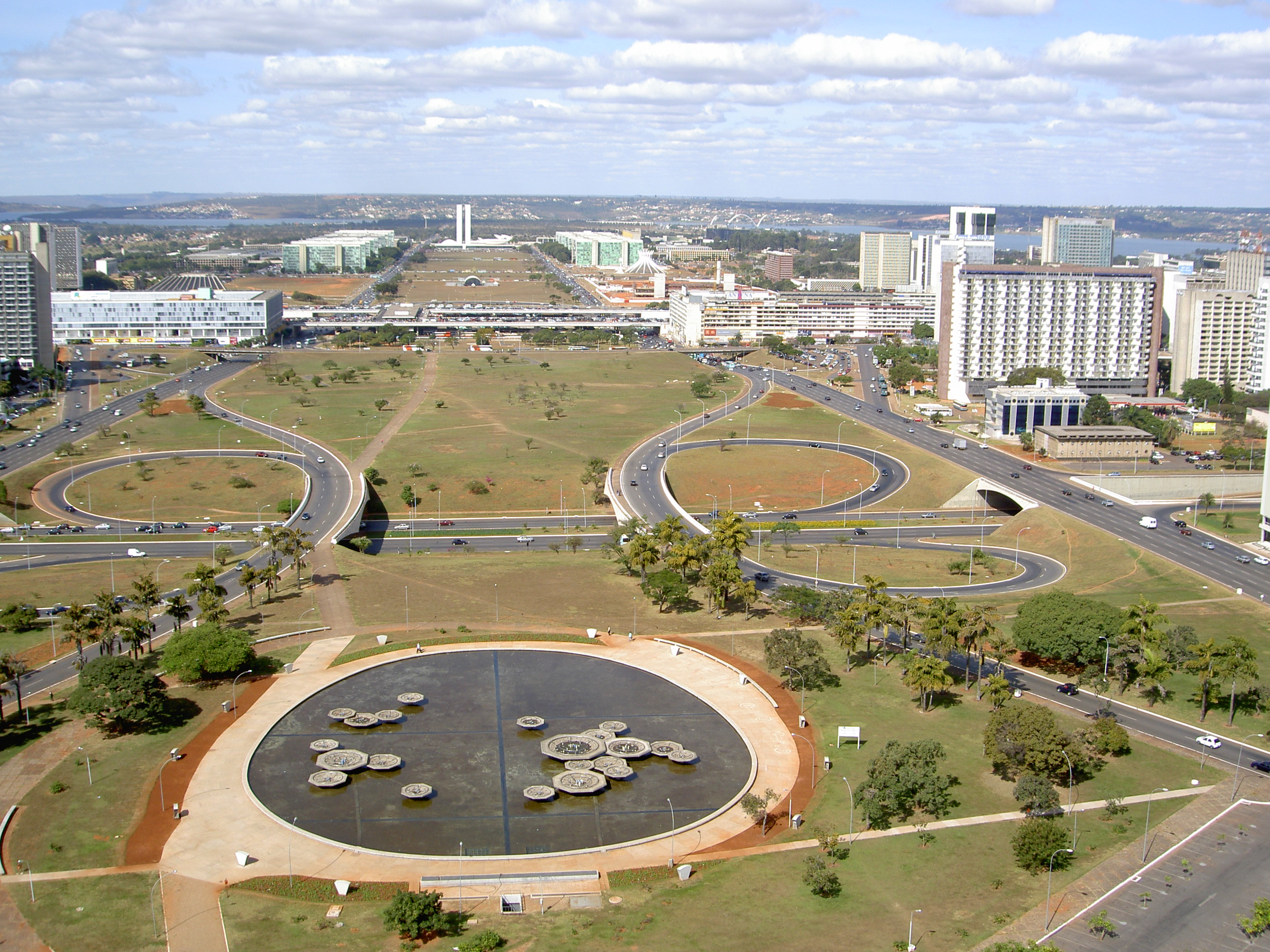 Бразилиа, центральная развязка, комплекс зданий федерального правительства – вид с телебашни